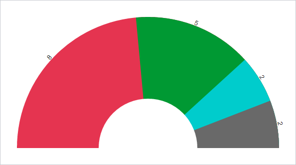 8. Vlada Federacije Bosne i Hercegovine: Socijaldemokratska partija Stranka demokratske akcije Narodna stranka Radom za boljitak Nestranački članovi